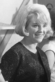 (z leve) Berta Ambrož, Elda Viler in Majda Sepe, Festival popevk Opatija 65.